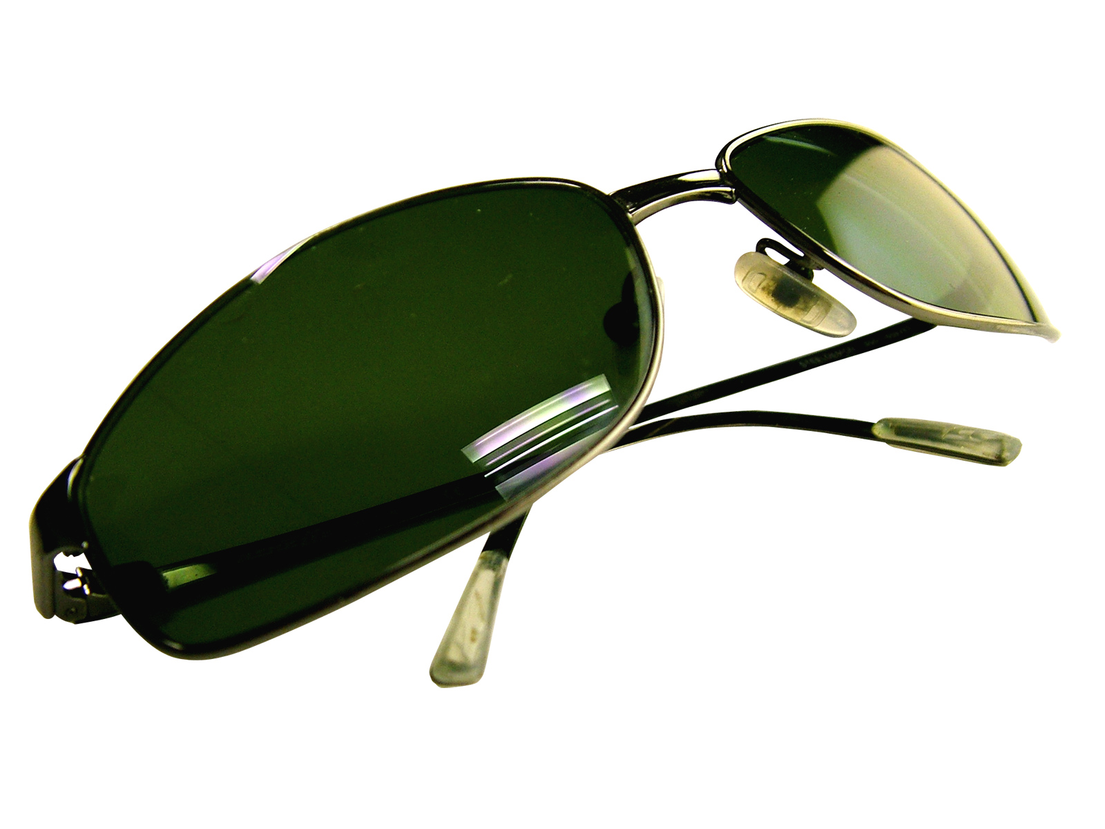 Sunglasses